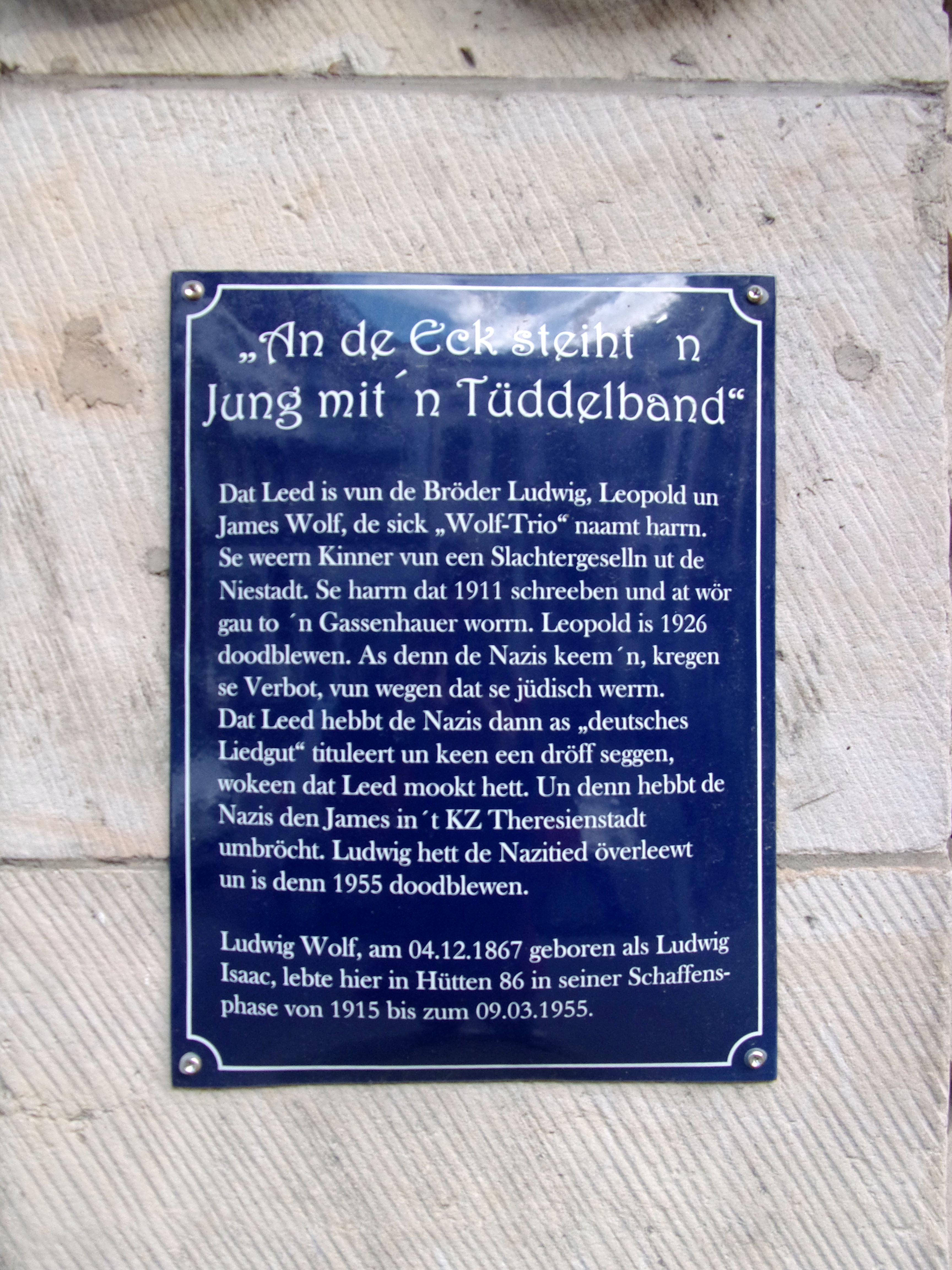 Blaue Tafel am Wohnhaus von Ludwig Wolf, einer der Gebrüder Wolf, die als Wolf-Trio und Gesangs-Humoristen mit bekannten Liedern - wie " An de Eck steiht ´n Jung mit ´n Tüddelband " ihren Lebensunterhalt verdienten. Die Tafel befindet sich am ehemaligen Wohnhaus von Ludwig Wolf in der Hamburger Neustadt, Hütten 86.